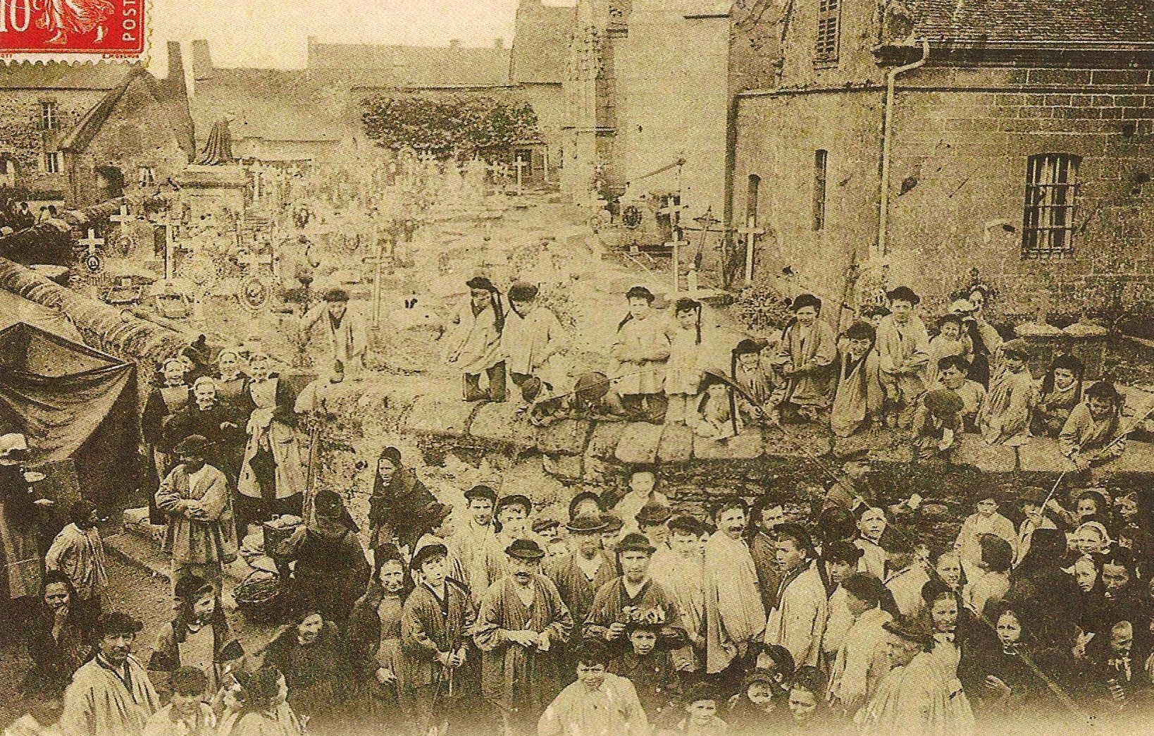 Foire aux gages en Bretagne : la foire aux gages est à date fixe, mais variable selon les cantons (à la Saint-Michel, à la Saint-Georges, etc...) ; c'est là qu'employeurs et domestiques concluent des contrats de travail souvent à l'année